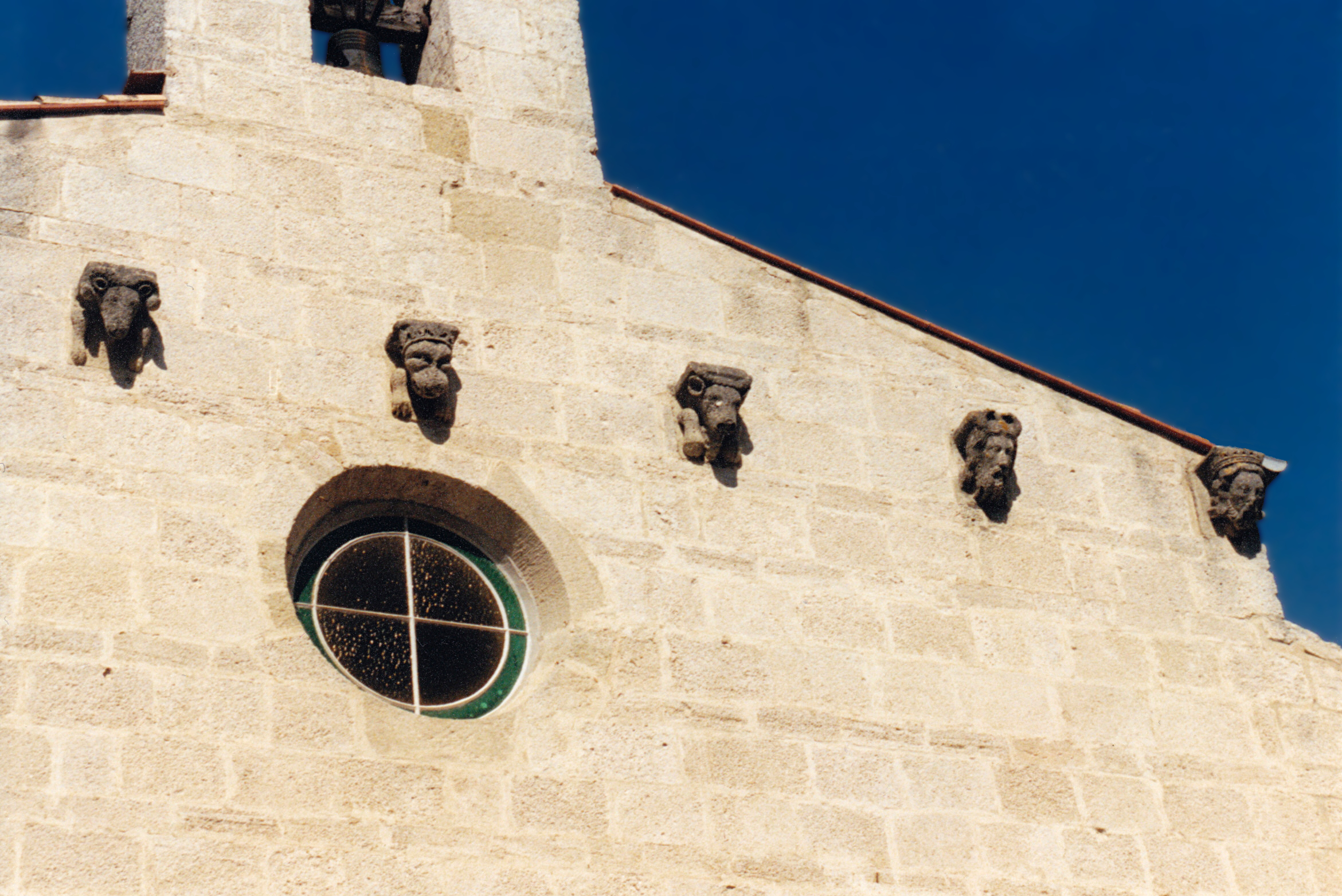 France - Languedoc - Hérault - Église Saint-Laurent de Lattes